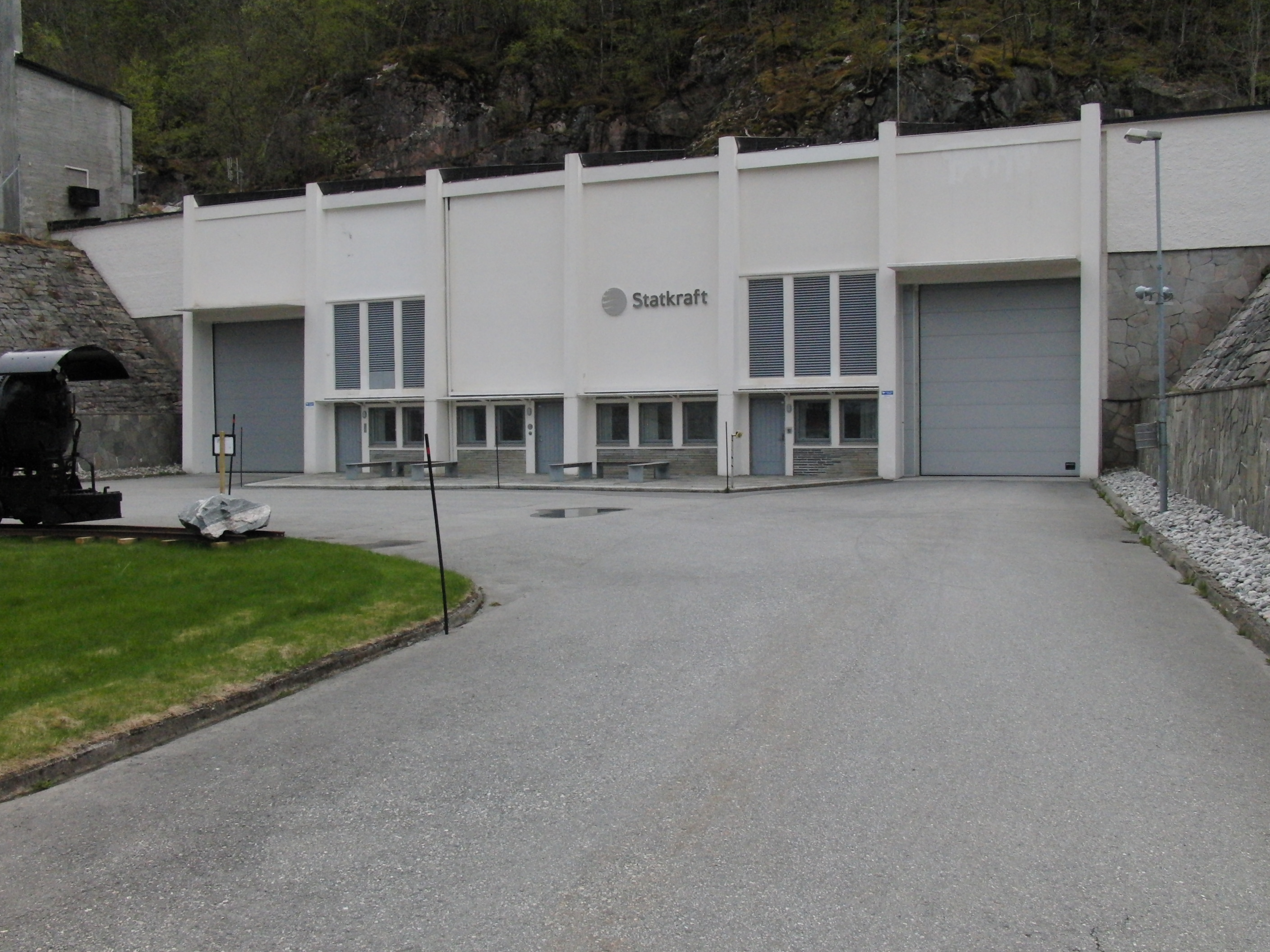 Aura kraftverk